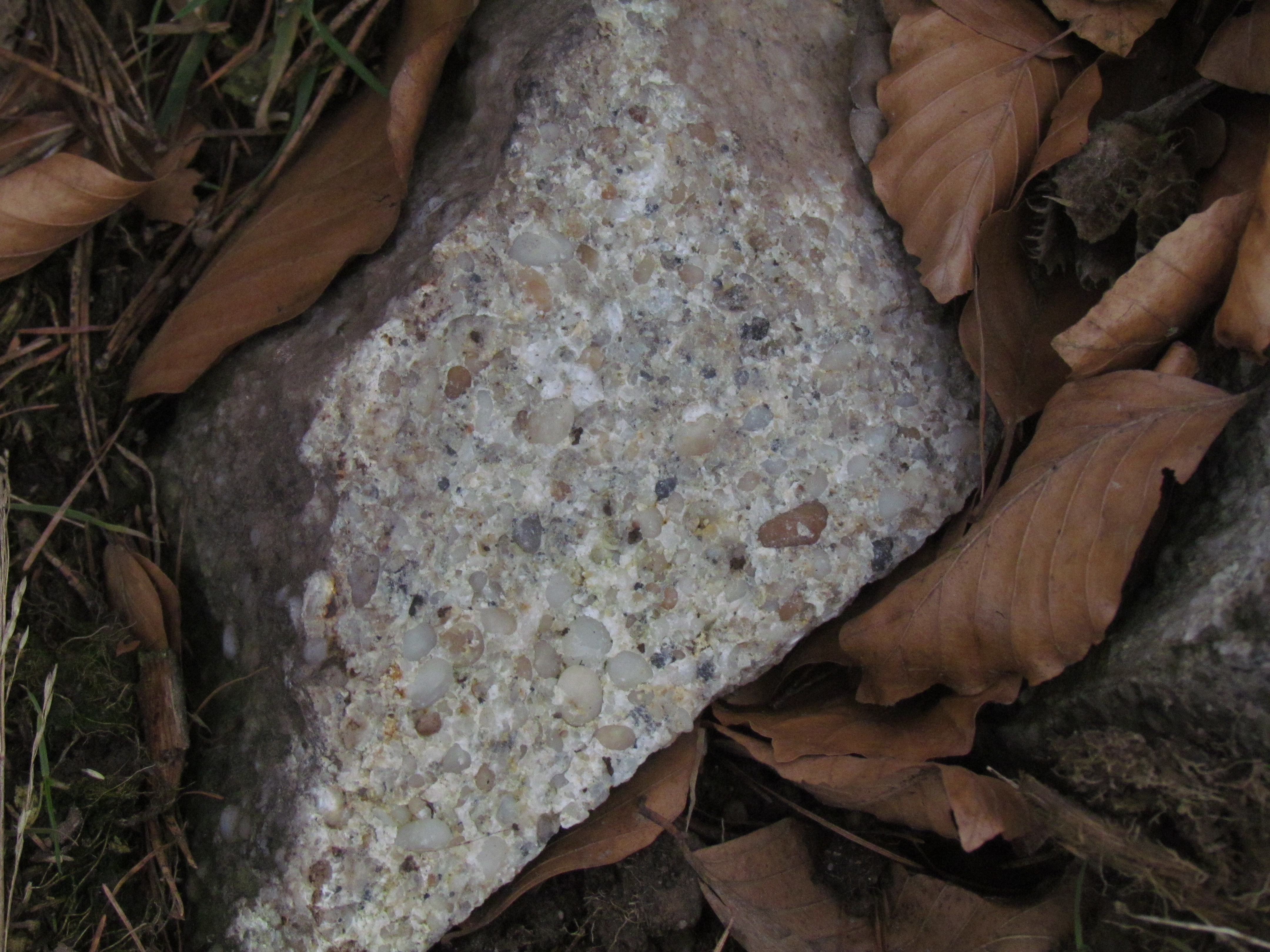 Detail Milečského slepence přímo na vrchu Mileč